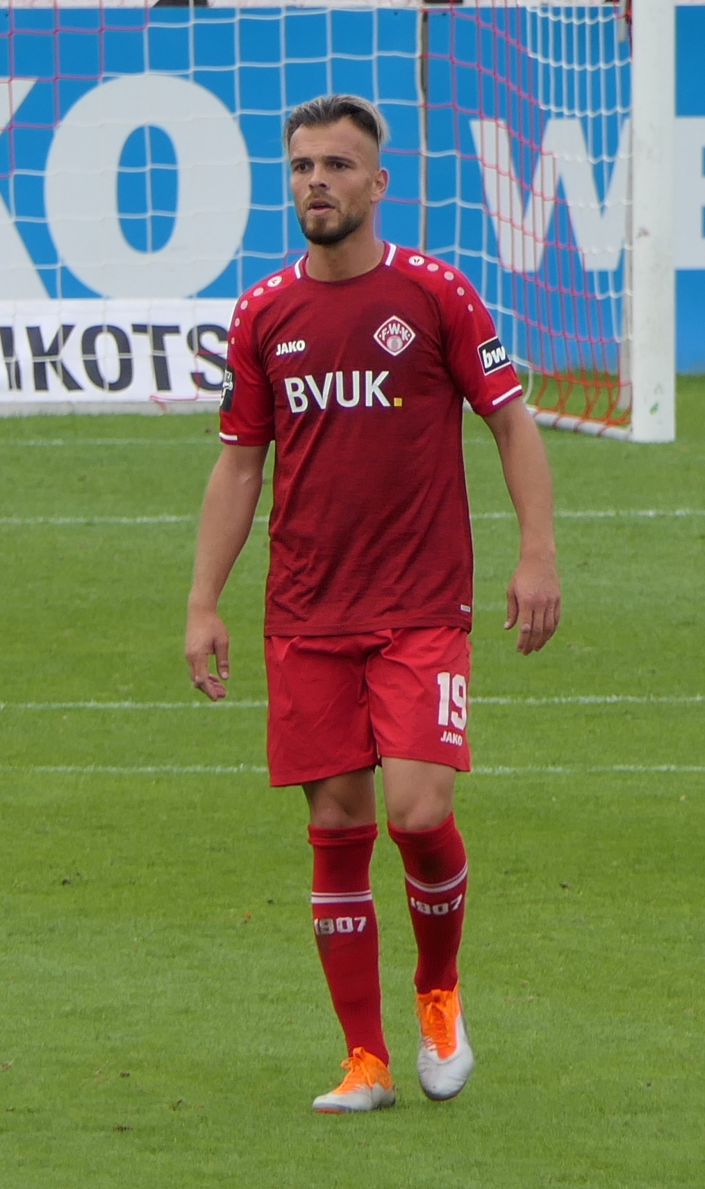 Der Fussballprofi Orhan Ademi im Trikot der Würzburger Kickers beim Heimspiel gegen Eintracht Braunschweig am 22.09.2018.